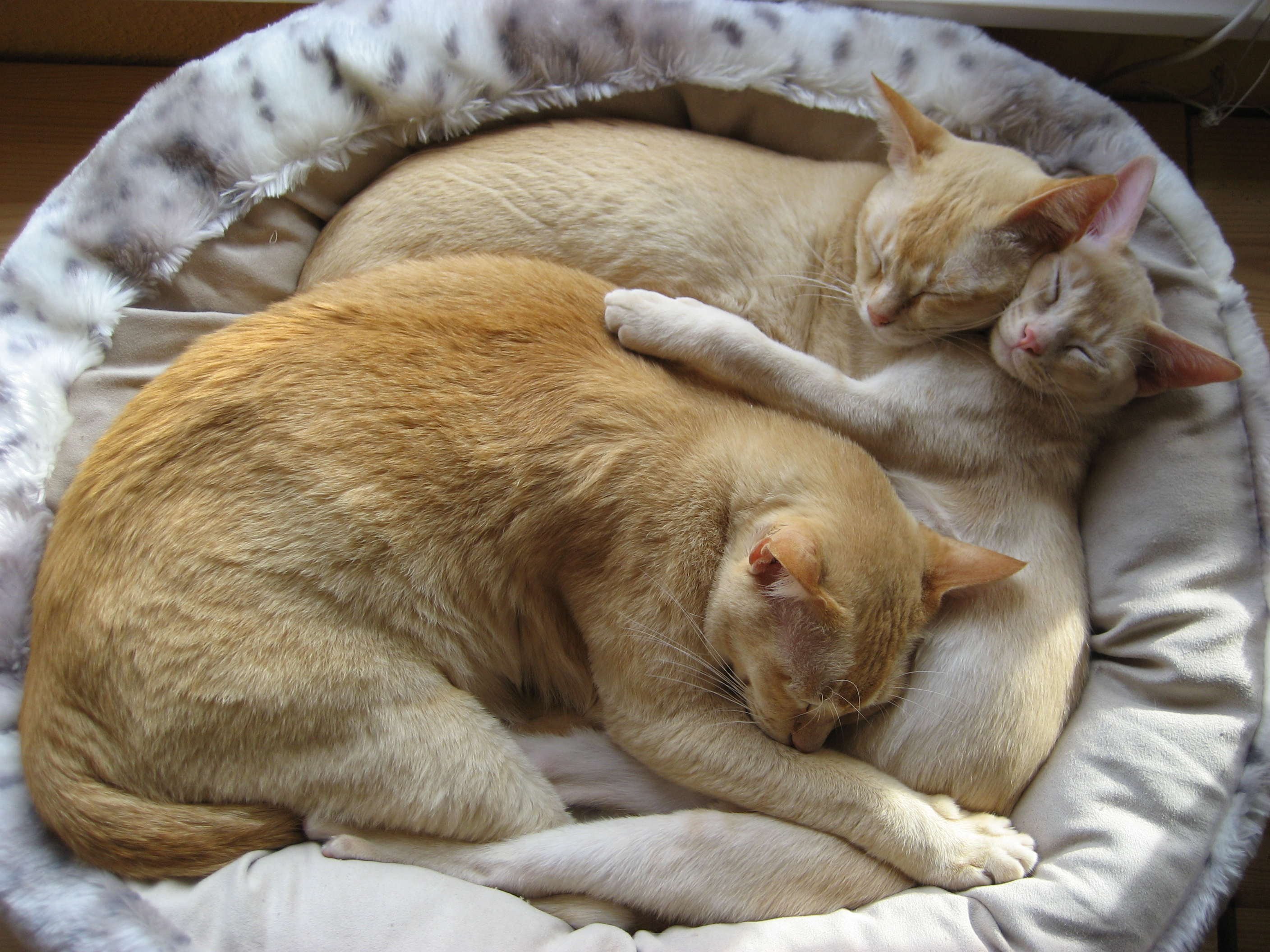 Typische Burmas